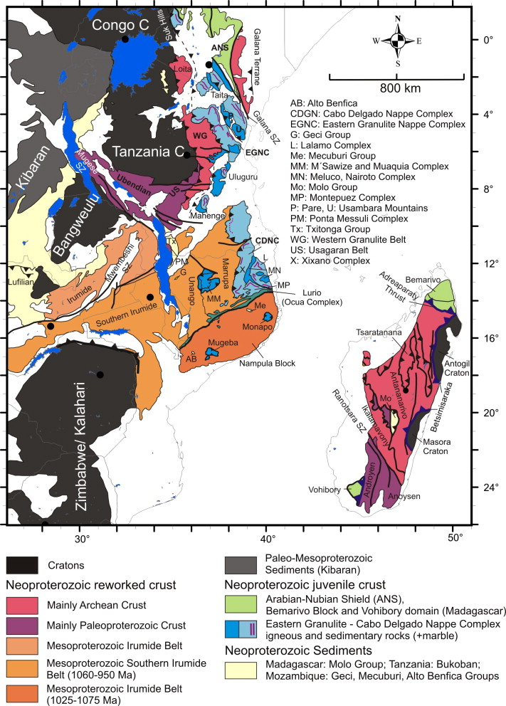 Crustal age domains and major litho-tectonic units in the southern East African Orogen.